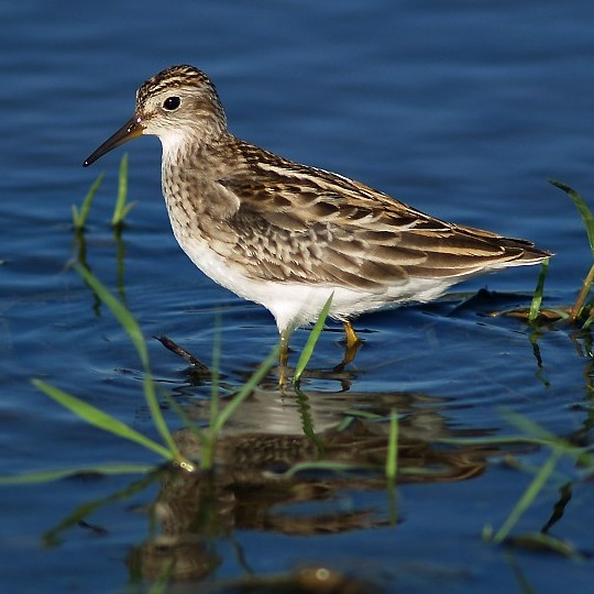 Calidris subminuta（雲雀鷸．長趾濱鷸）, Taoyuan County, Taiwan. 2007.